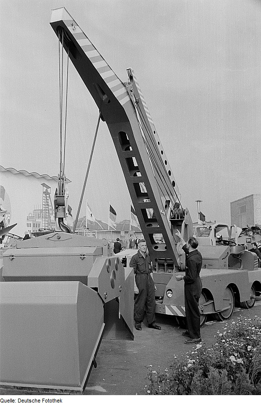 Original image description from the Deutsche Fotothek Kräne auf der Leipziger Herbstmesse 1954